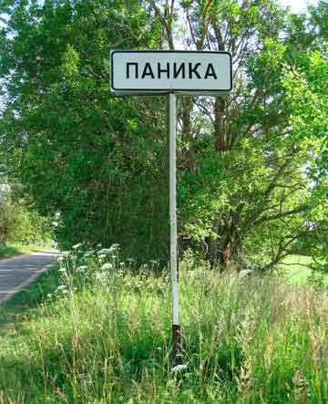 Деревня Паника